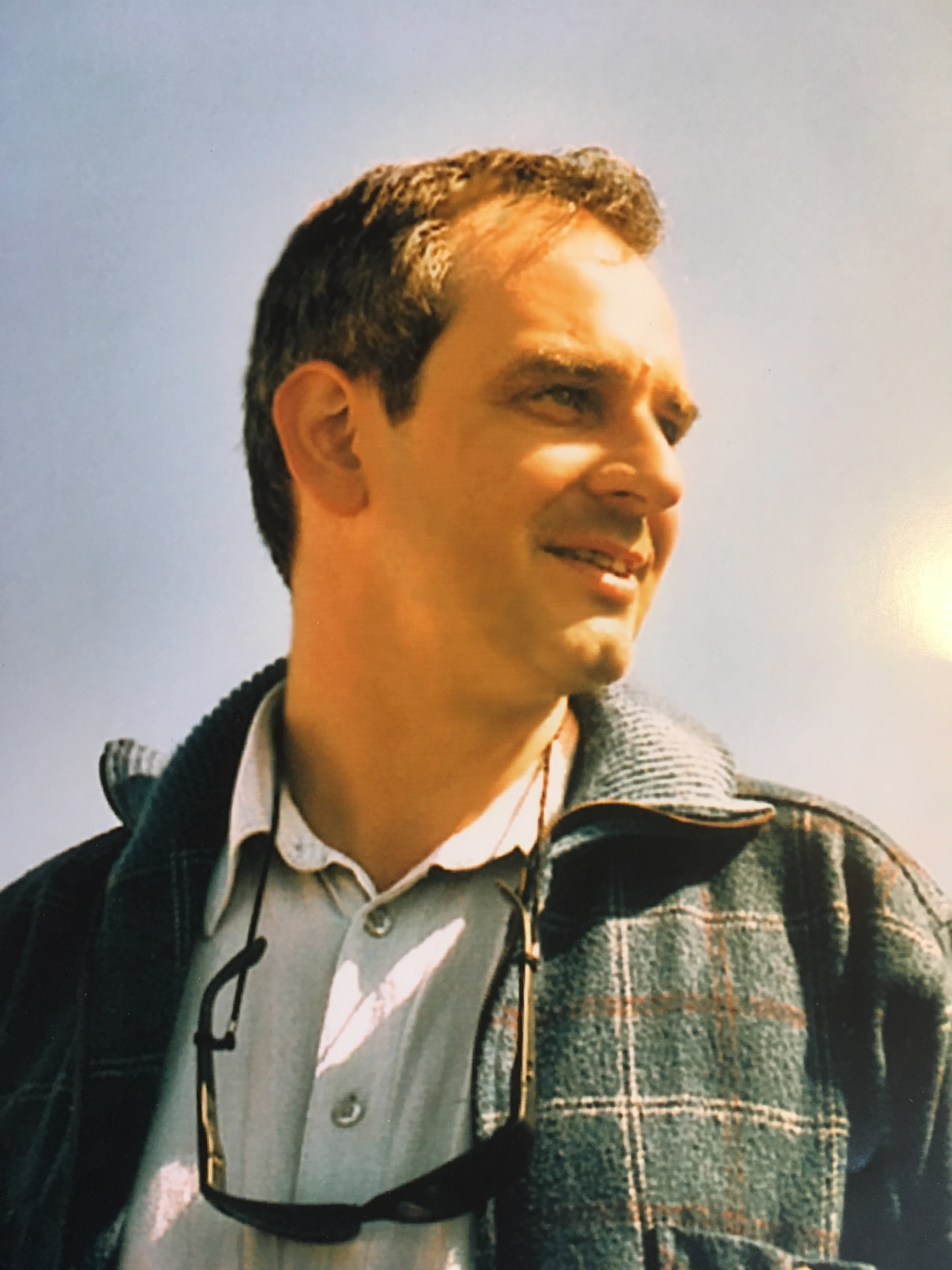 Jean-Pascal Beintus